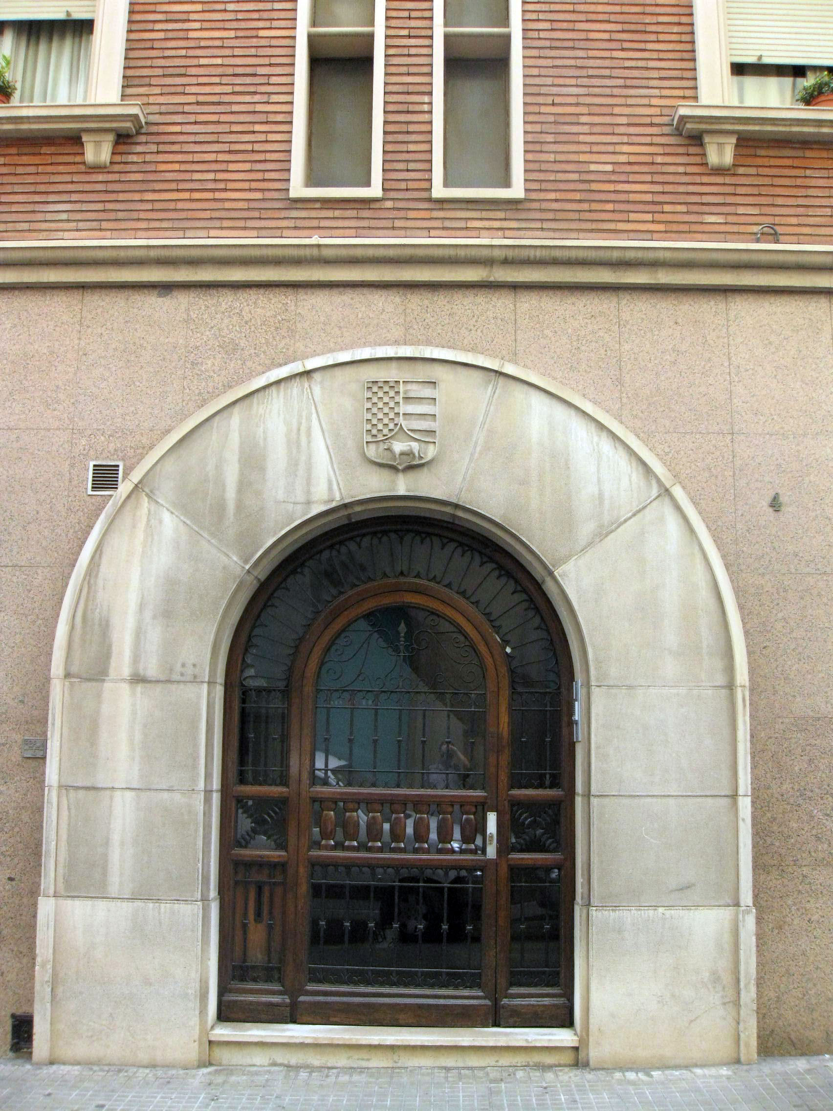 Edifici d'habitatges al carrer Major núm. 11, cantonada amb el carrer del Forn núm. 42 (Terrassa). Obra monumental academicista d'Ignasi Escudé (1941). Vista del portal del carrer del Forn.